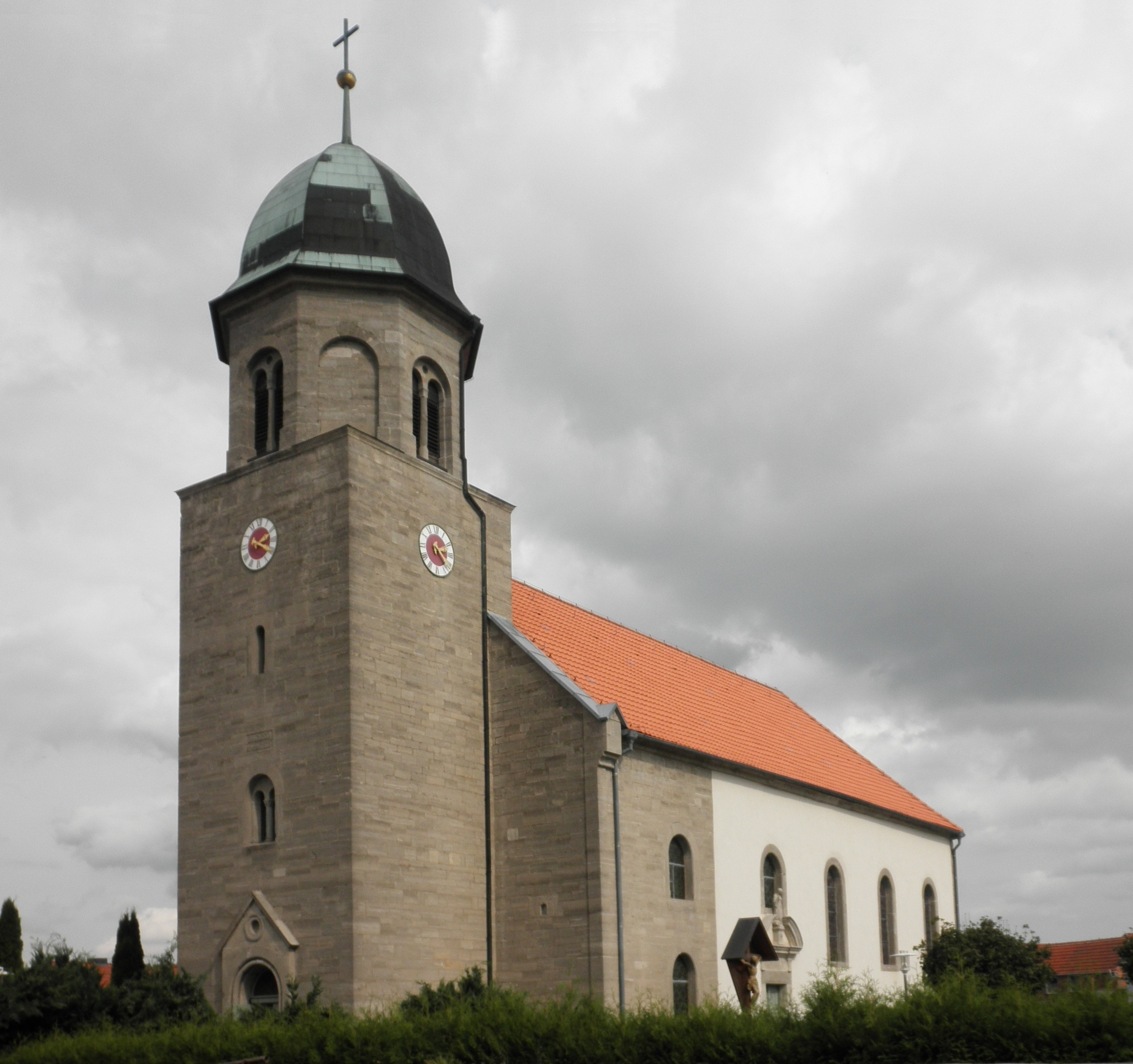 Kath. Kirche St. Margareta in Büttstedt im südlichen Eichsfeld (Thüringen)